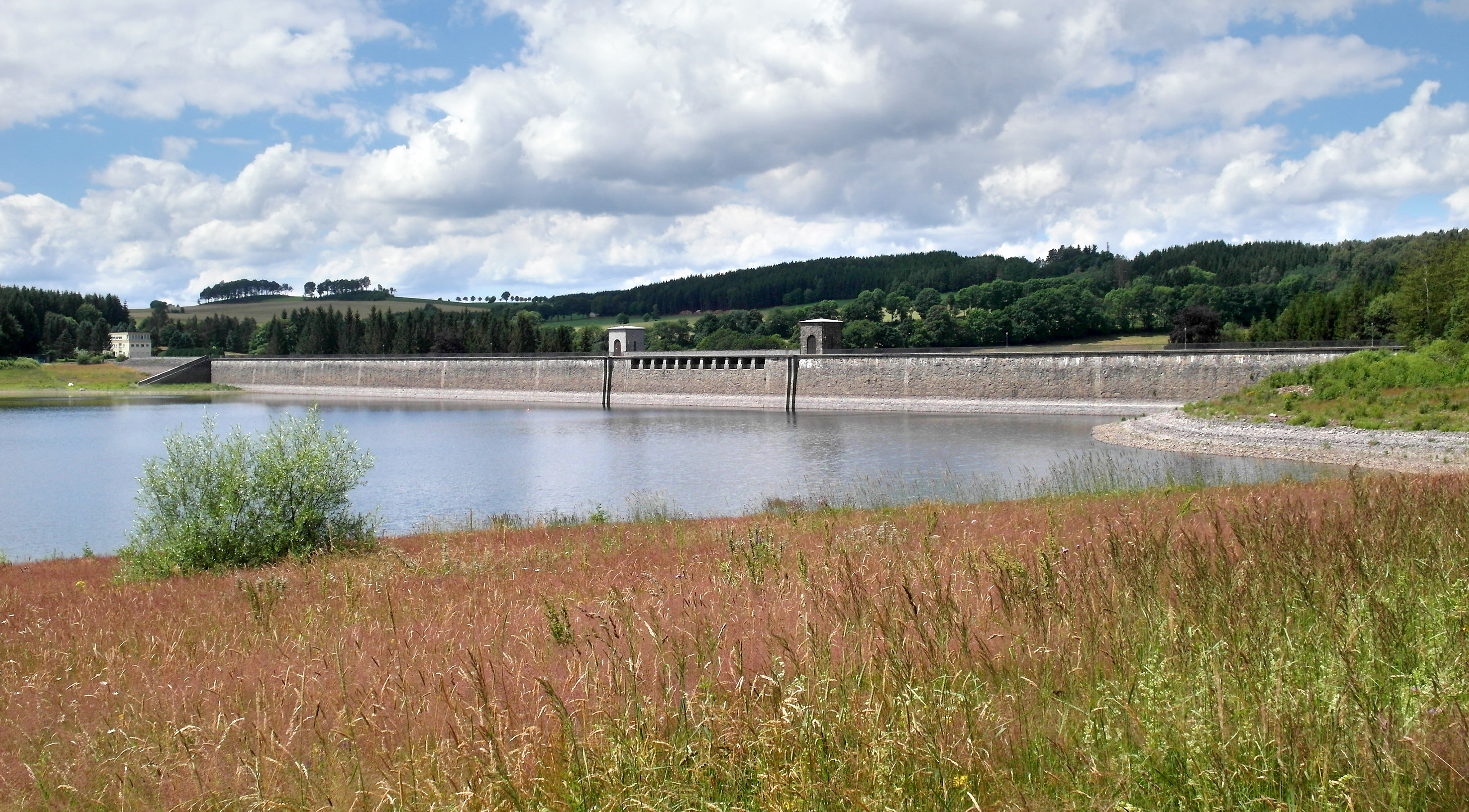 04.07.2016 01762 Hartmannsdorf-Reichenau: Talsperre und Wasserkraftwerk Lehnmühle, Lehnmühle 35 E. Blick von SO über den Stausee zur Staumauer. Sie dient der Trinkwasserversorgung von Dresden, zusätzlich auch dem Hochwasserschutz und in geringem Maße der Stromerzeugung. Die Staumauer der Talsperre Lehnmühle ist eine gerade Gewichtsstaumauer aus Bruchsteinmauerwerk. Die Talsperre wurde von 1927 bis 1931 erbaut und im Jahre 1931 in Betrieb genommen. Das gestaute Gewässer ist die Wilde Weißeritz. [SAM6806.JPG]20160704205DR.JPG(c)Blobelt